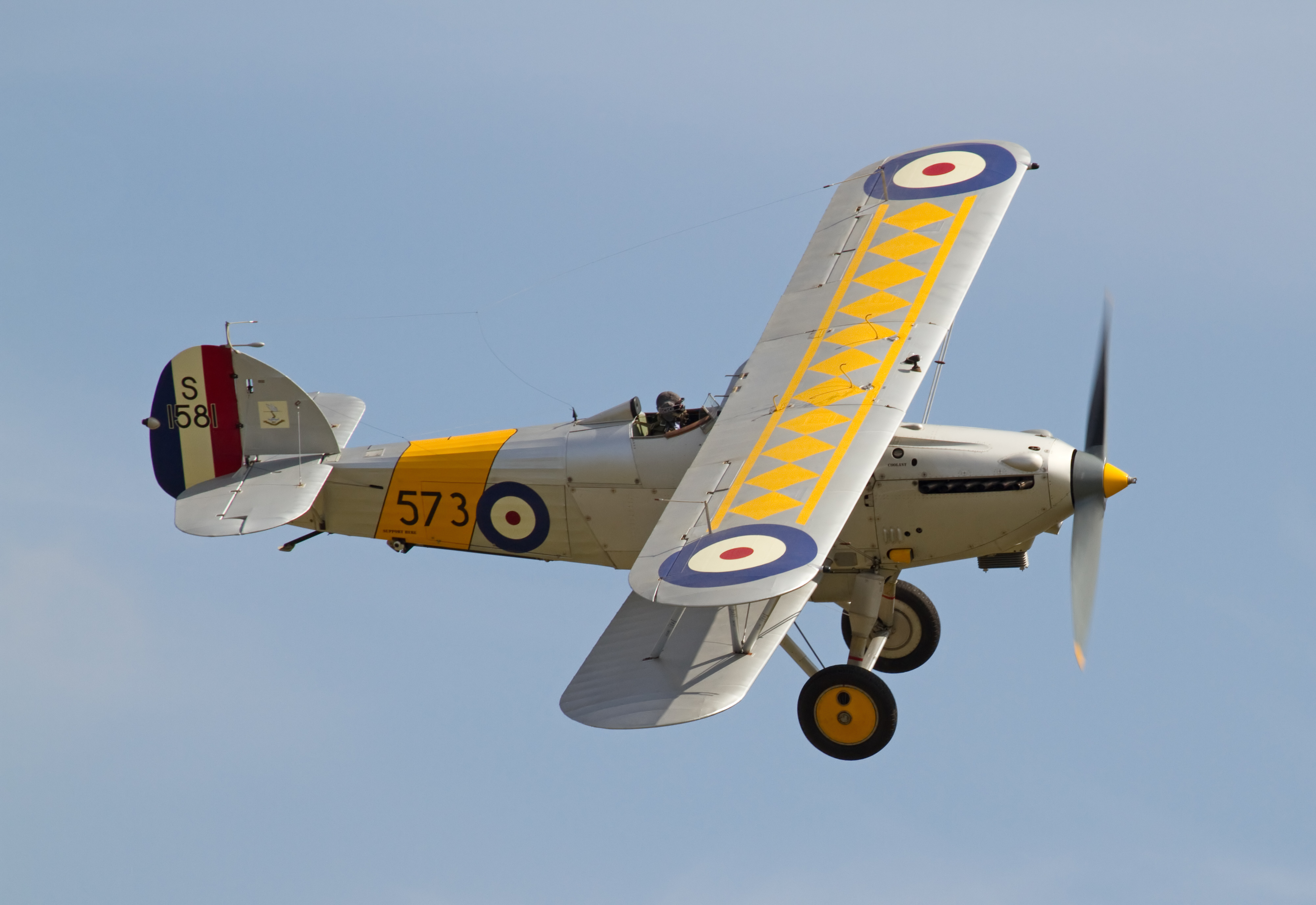 Hawker Nimrod I S1581 1a